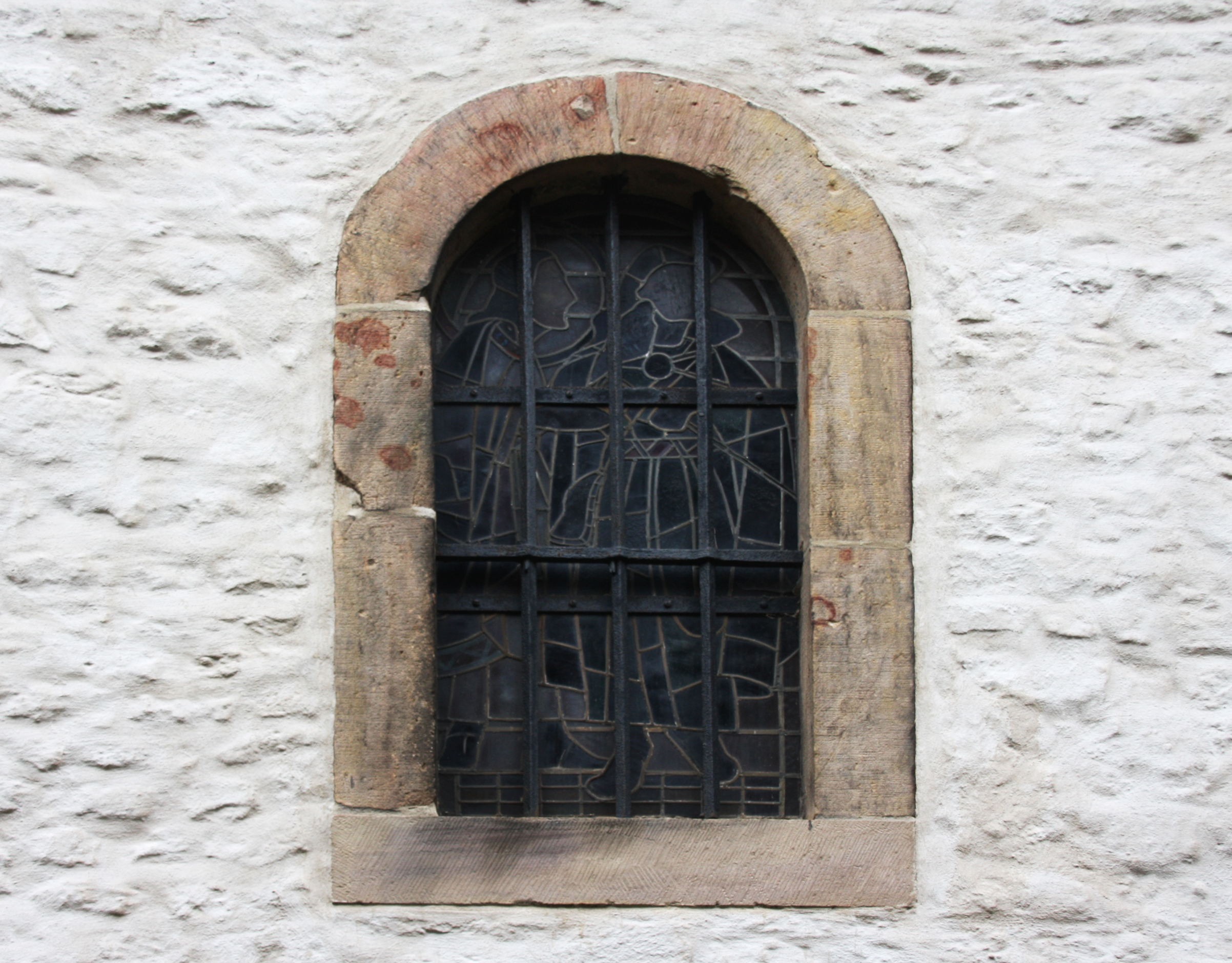 Ein Rundbogenfenster im nördlichen Nebenschiff